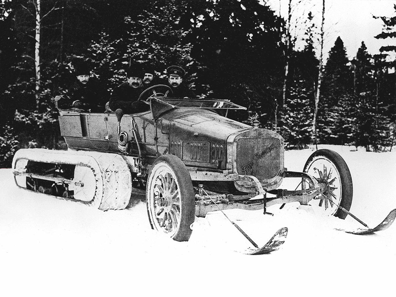 «Руссо-балт» «C24-30» из гаража Его Императорского Величества с полугусенечным приводом конструкции Адольфа Кегресса (начальника гаража и личного водителя Николая II)